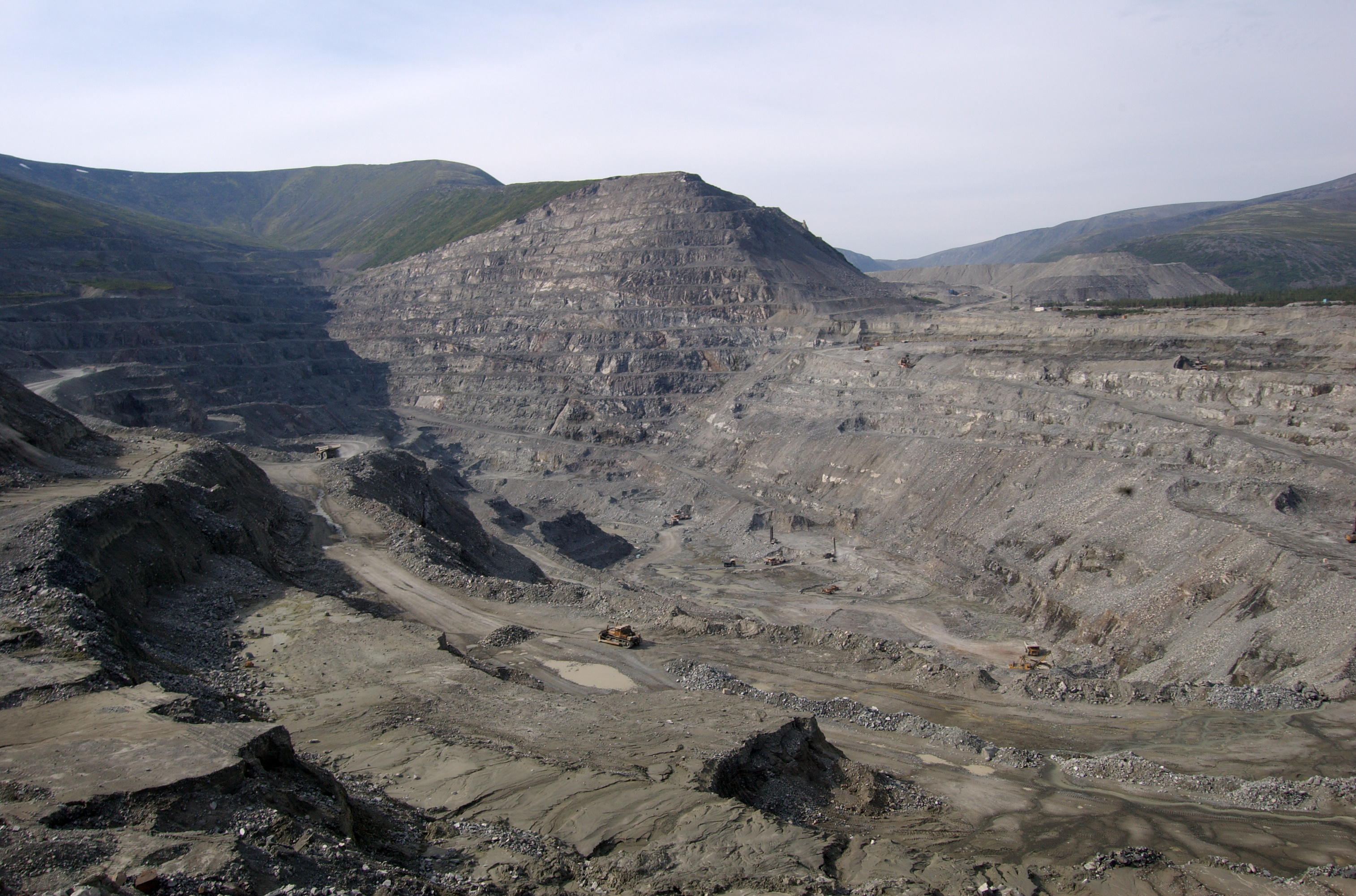 Хибины, Восточный рудник рядом с Коашвой